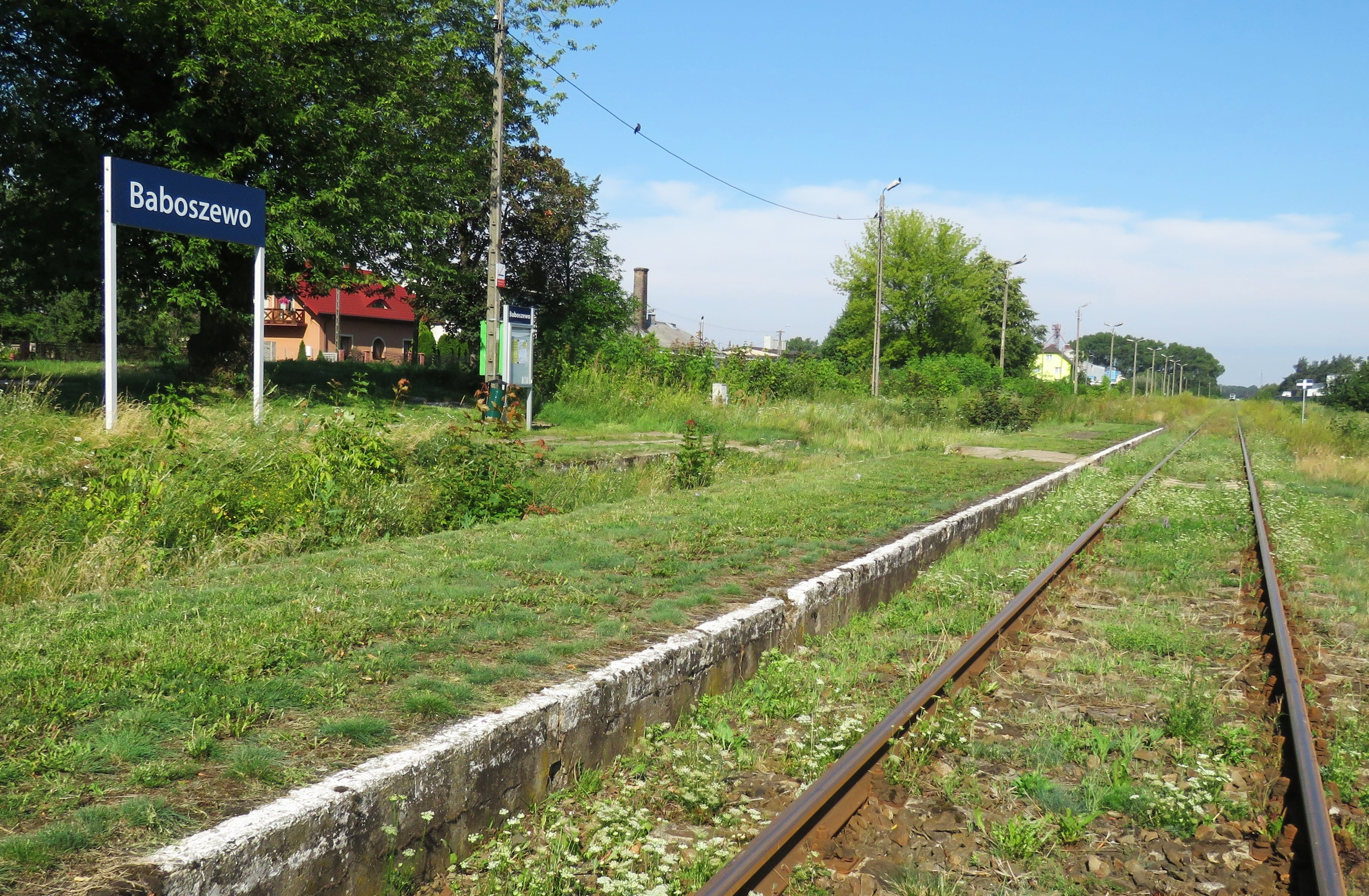 Baboszewo - przystanek kolejowy